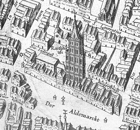 Ausschnitt des Mercator – Stadtplanes Köln. Bereich „Historisches Rathaus“ und Umfeld